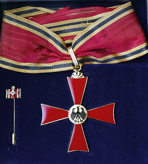 Großes Verdienstkreuz des Verdienstordens der Bundesrepublik Deutschland. Halsorden mit Miniatur (Bandsteg).